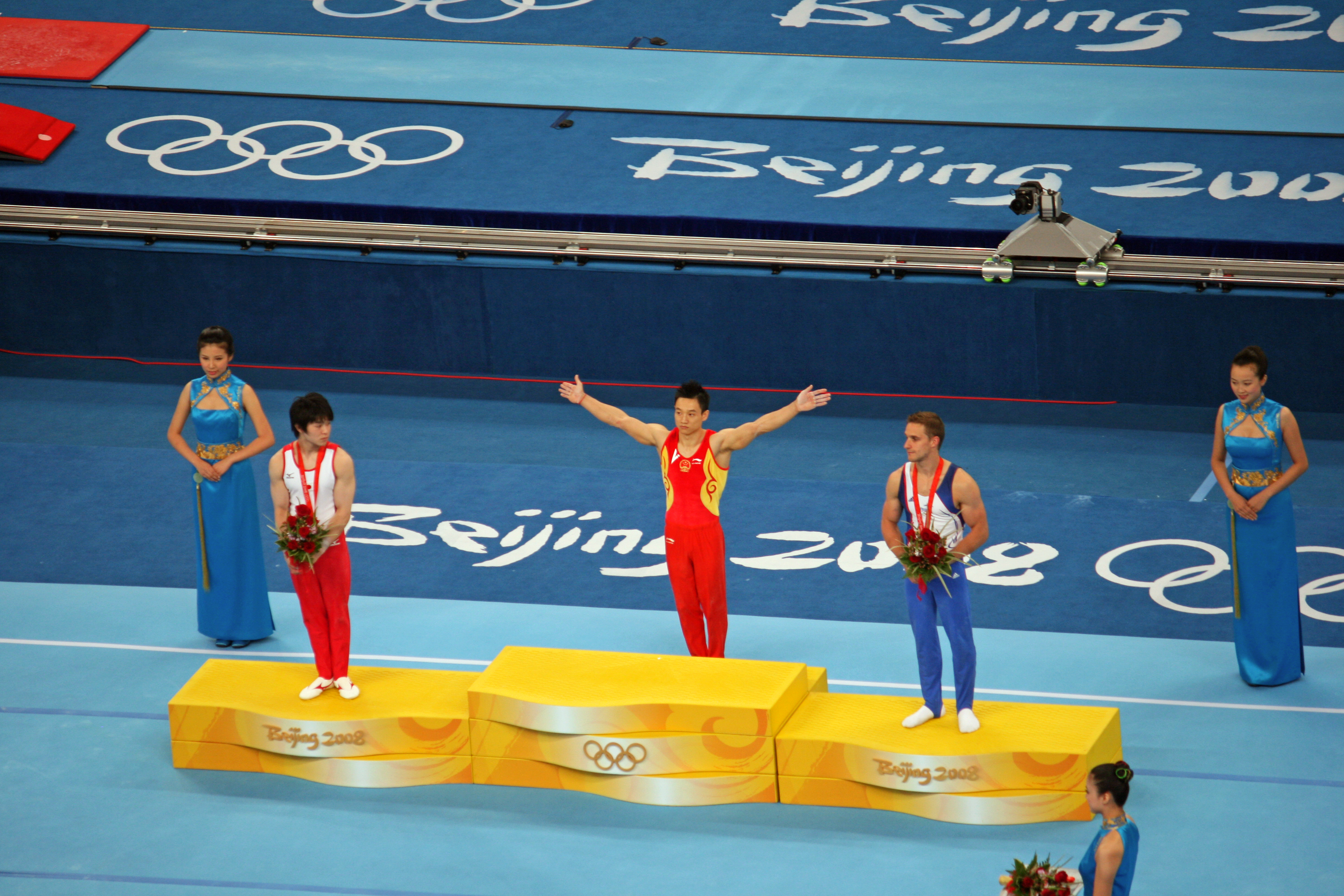 Podium Pékin 2008, gymnastique, hommes.